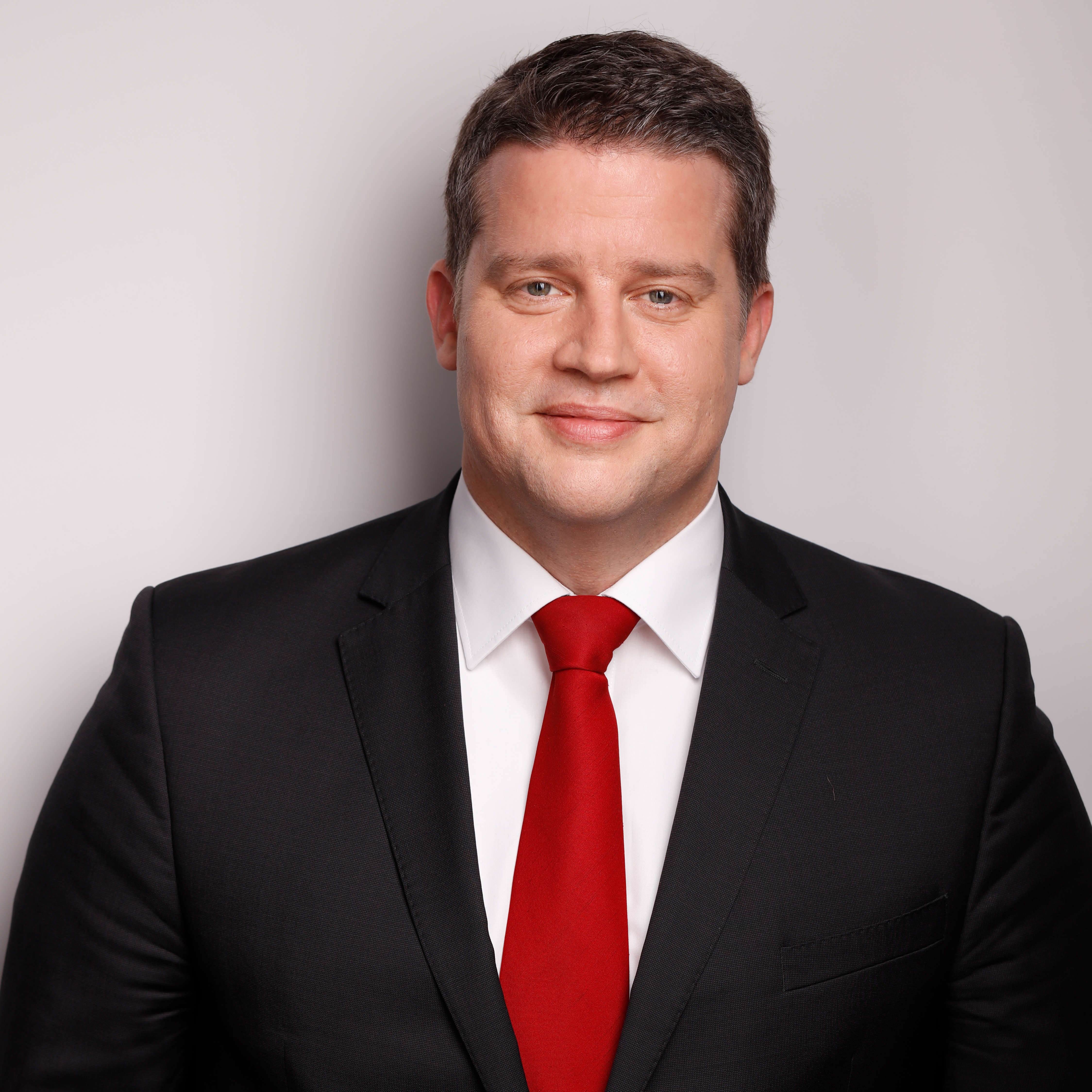 Carsten Träger, Mitglied des Deutschen Bundestages SPD